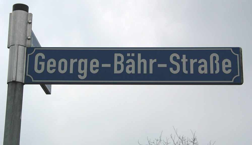 Die George-Bähr-Straße im Leipziger "Architektenviertel", benannt nach dem Baumeister George Bähr .